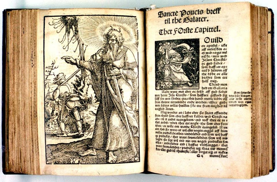 Melchior Lotters danske Nystestamente.